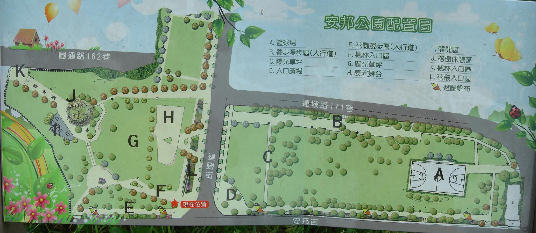 中文（台灣）: 台北縣中和市安邦公園平面配置圖。